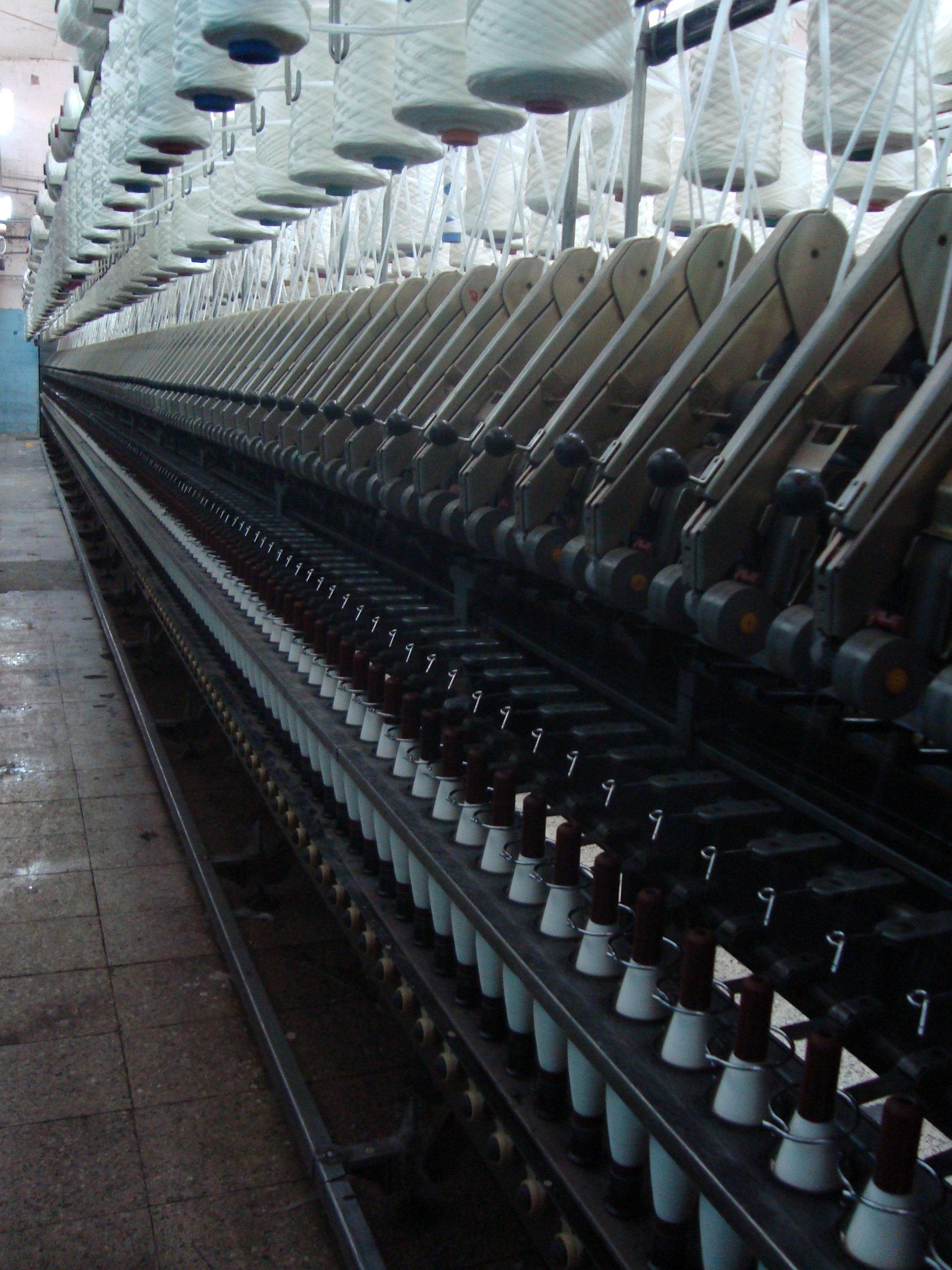 Maquina para hacer hilo